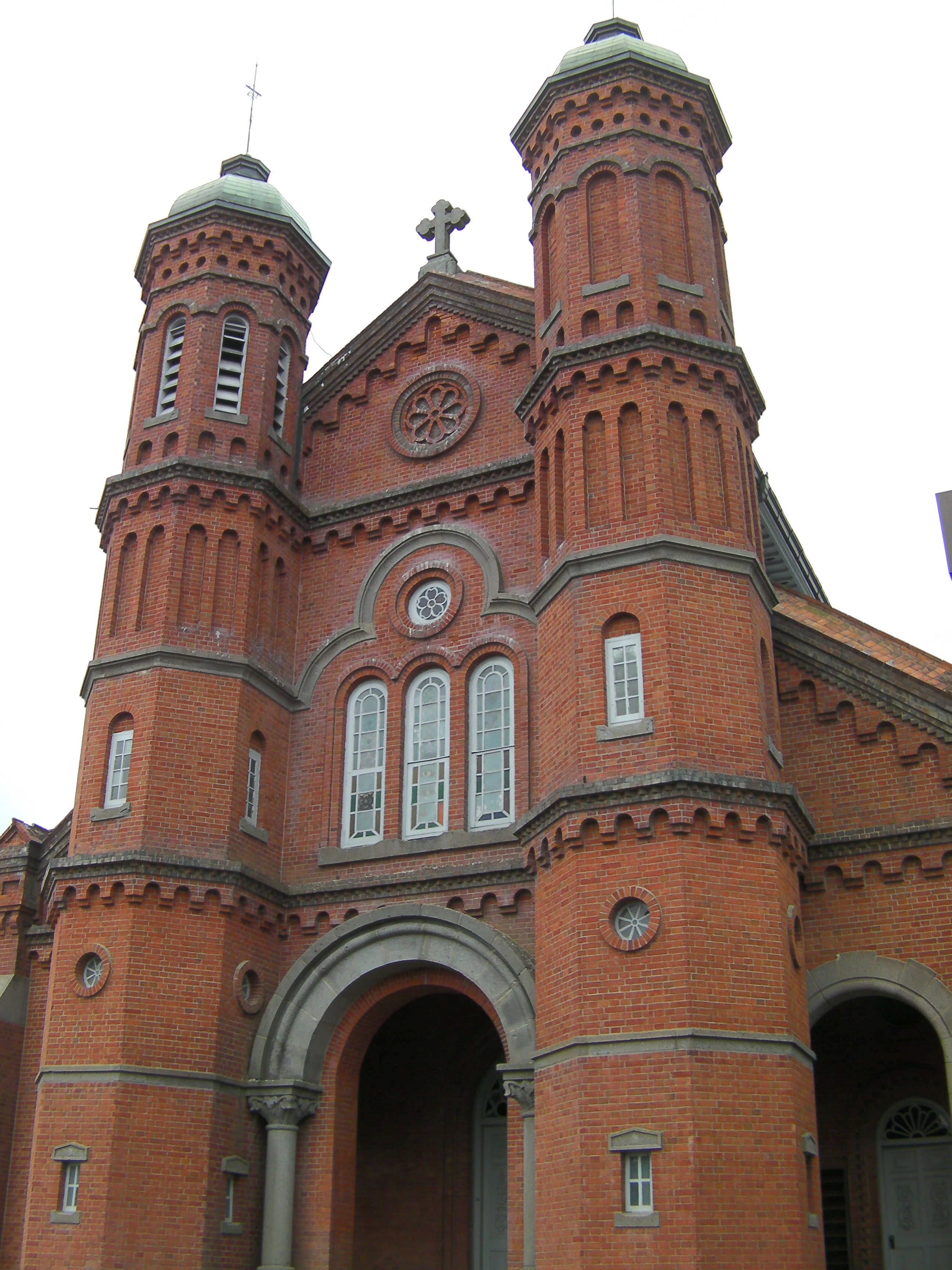 今村教会堂